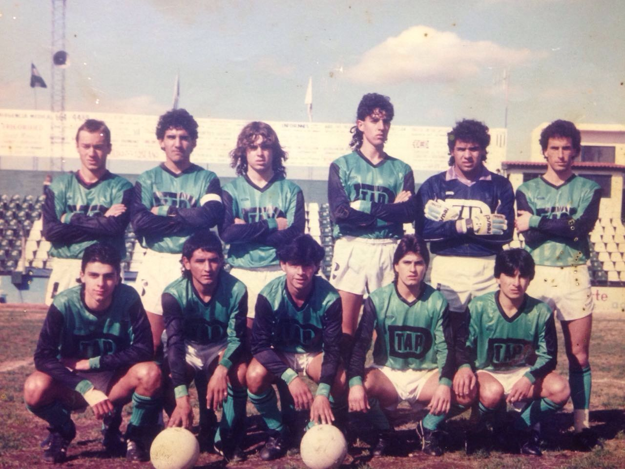 Messina en sus inicios...